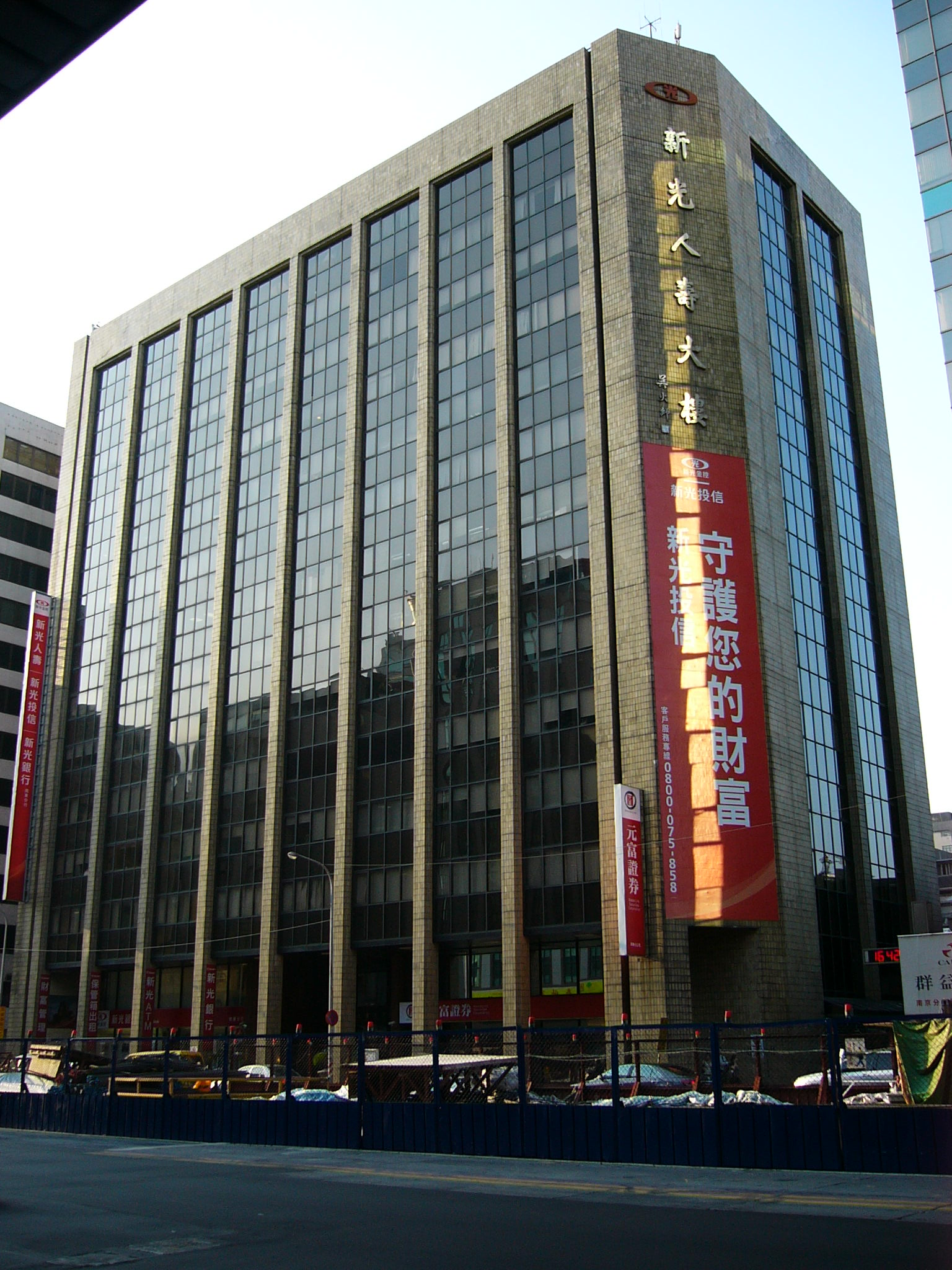 臺北市中山區南京東路二段新光人壽大樓。